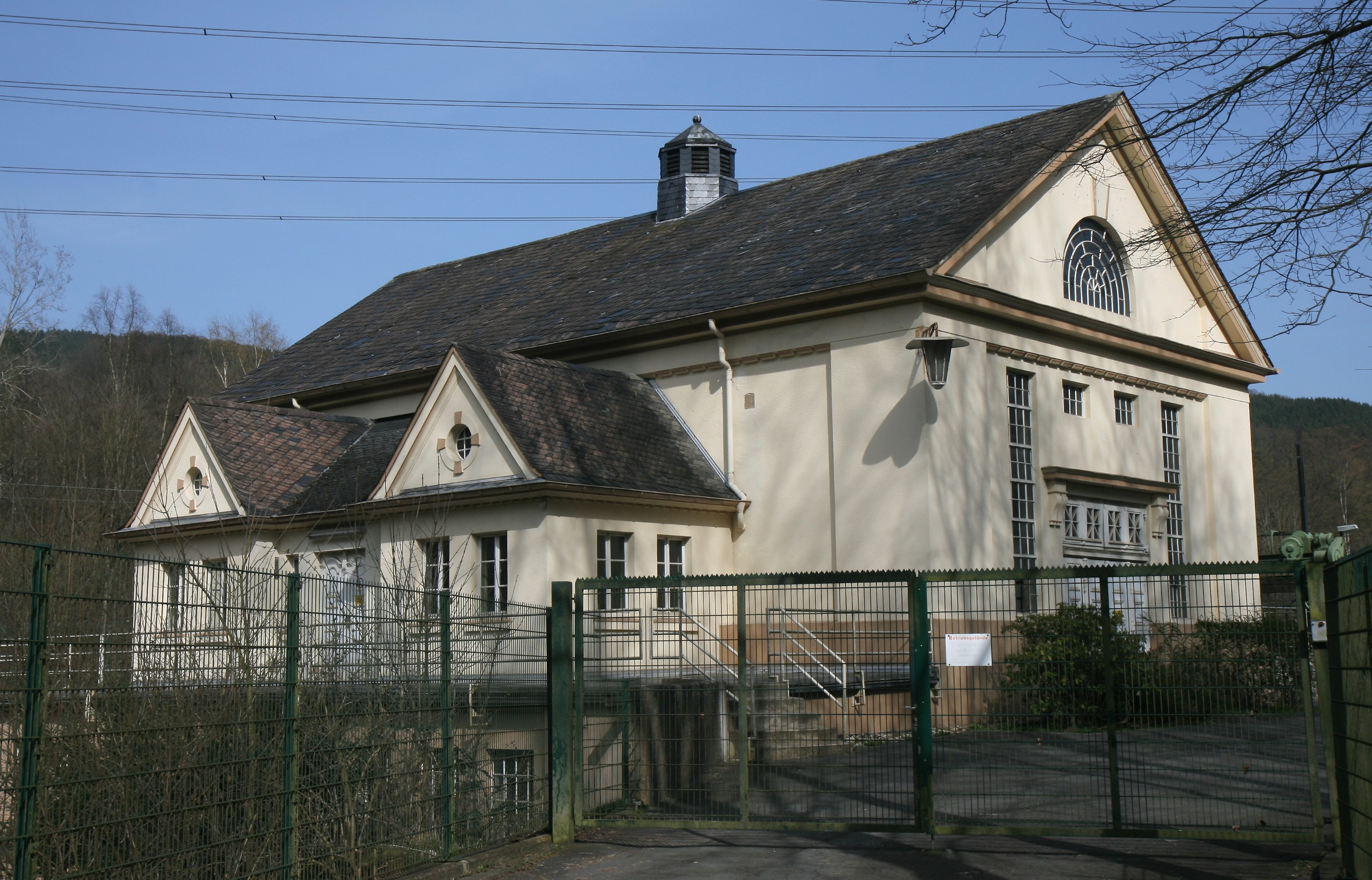 Betriebsgebäude des Laufwasserkraftwerkes Siesel in Plettenberg-Siesel.